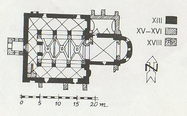 Planul bisericii evanghelice din Rosia, Sibiu